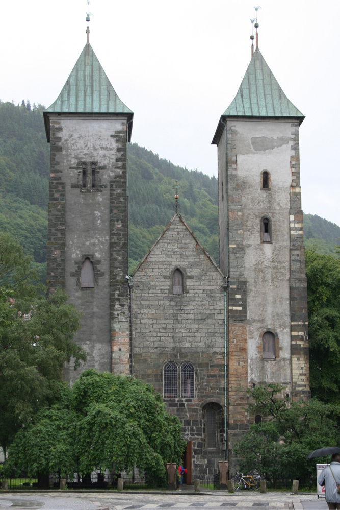 Mariakirken in Bergen